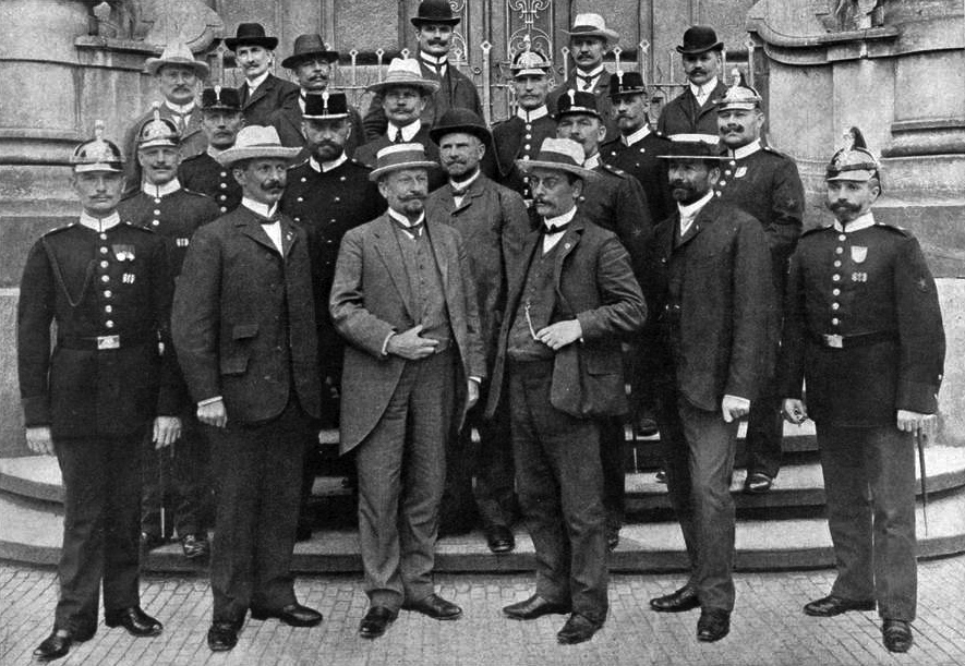 D-ro Mybs kaj d-ro Schramm kun grupo de esperantistoj-policistoj de Dresdeno.